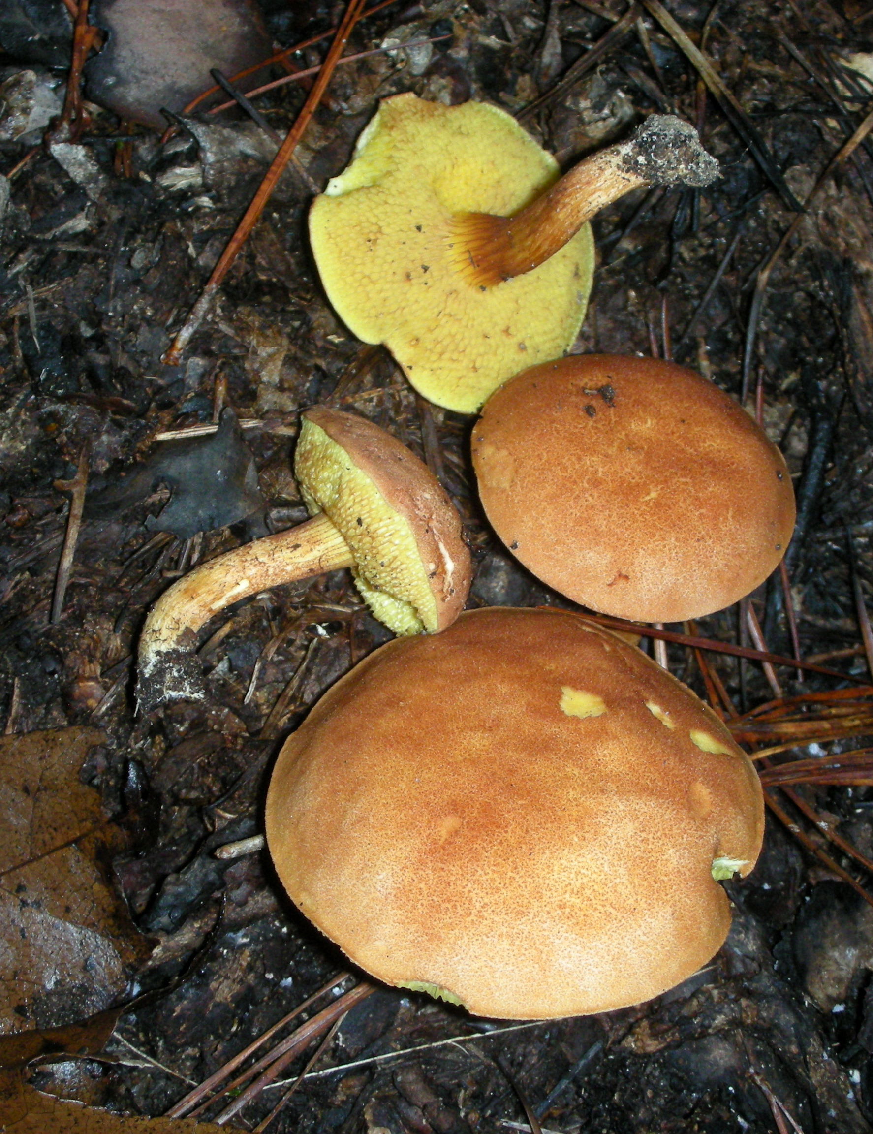 Boletus ferrugineus Schaef.